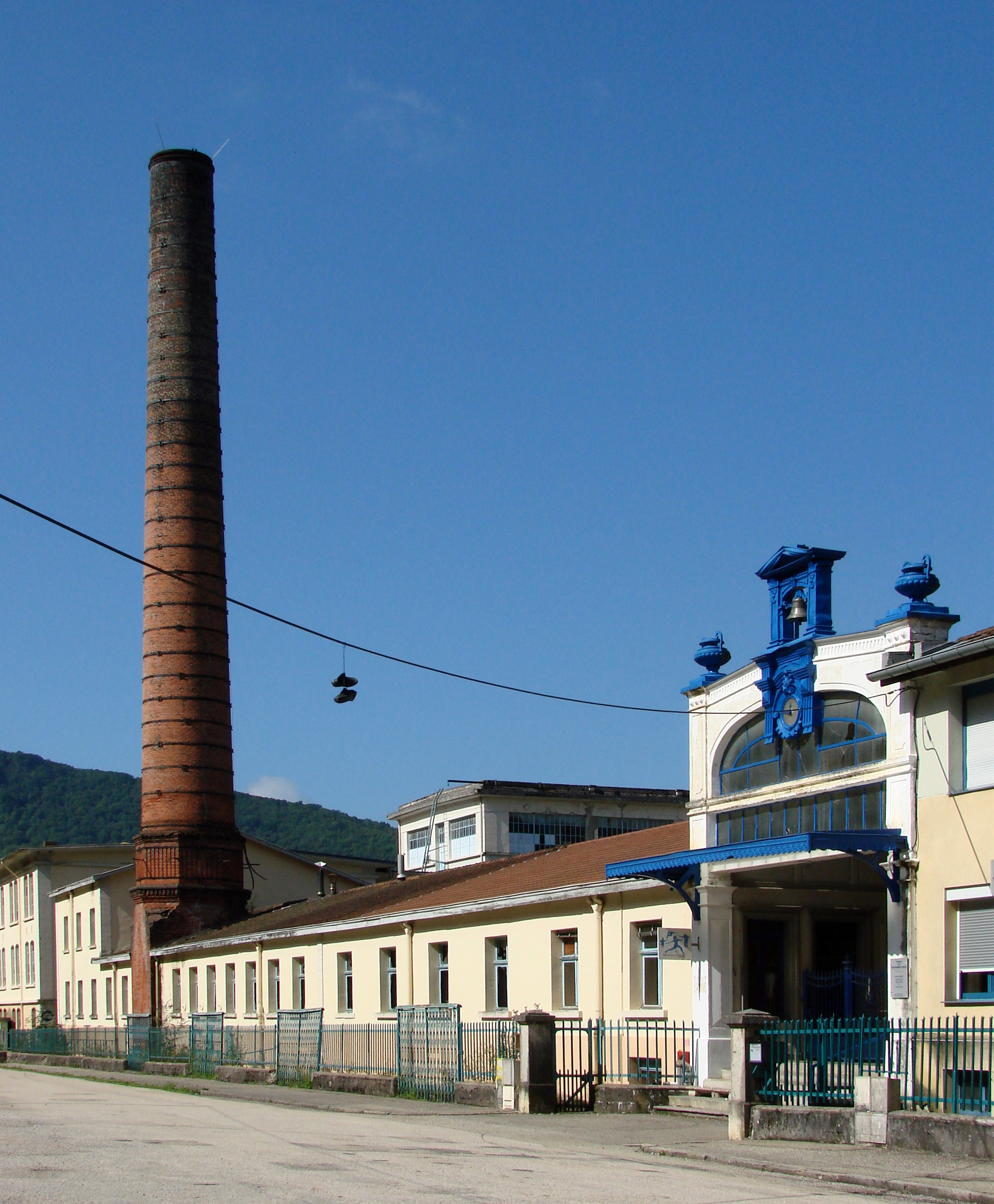 Bâtiments subsistants de la "Schappe" de Saint-Rambert-en-Bugey le 31/07/2014